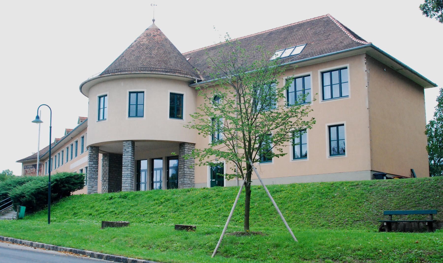 Volks- und Hauptschule von Drosendorf in Niederösterreich